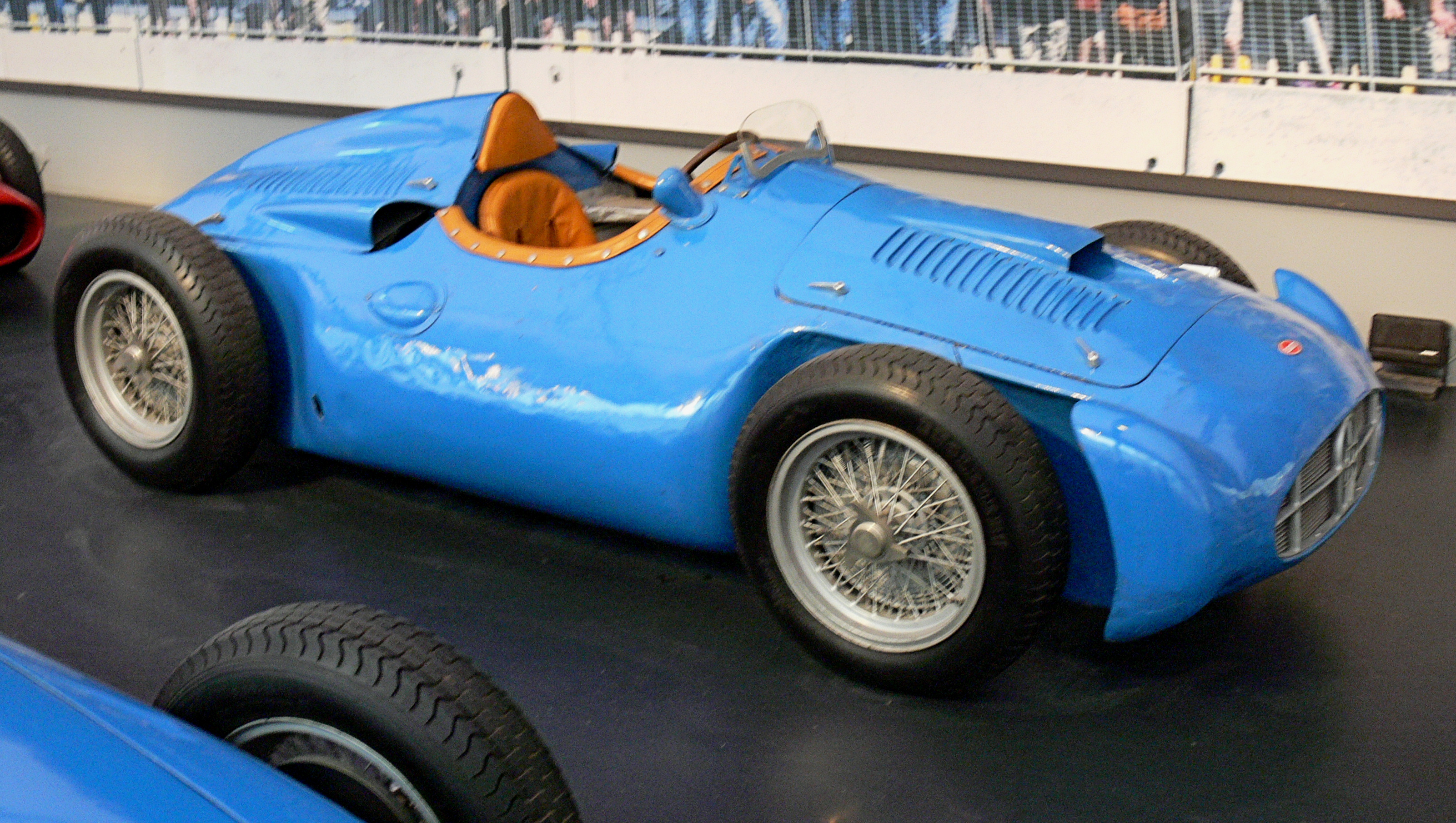 Bugatti Monoplace GP 251 (1955) im Musée National de l'Automobile (Mulhouse)